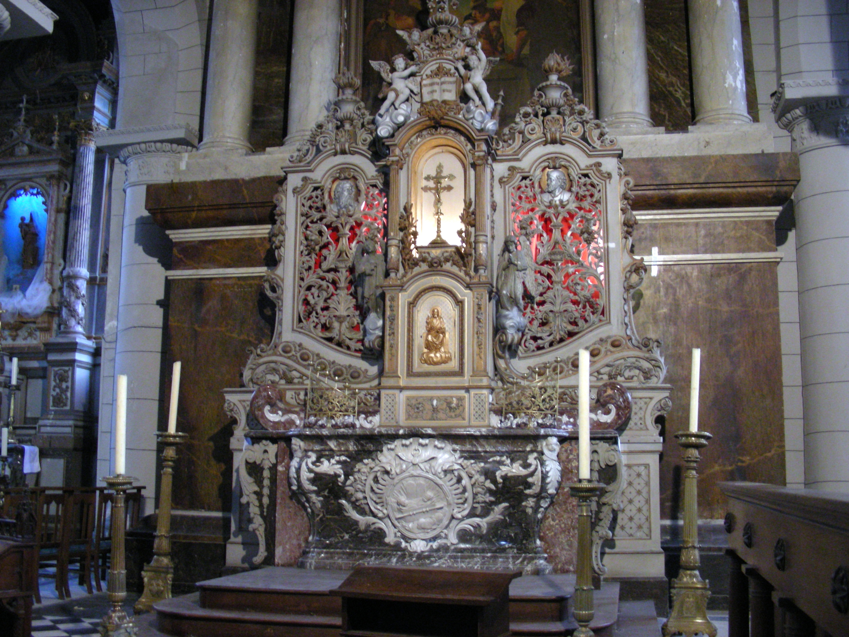 Cassel, Nord La restauration vient de se terminer (2012)